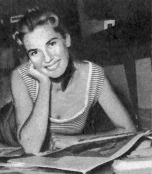 photo from Italian magazine Avanguardia, 1956.